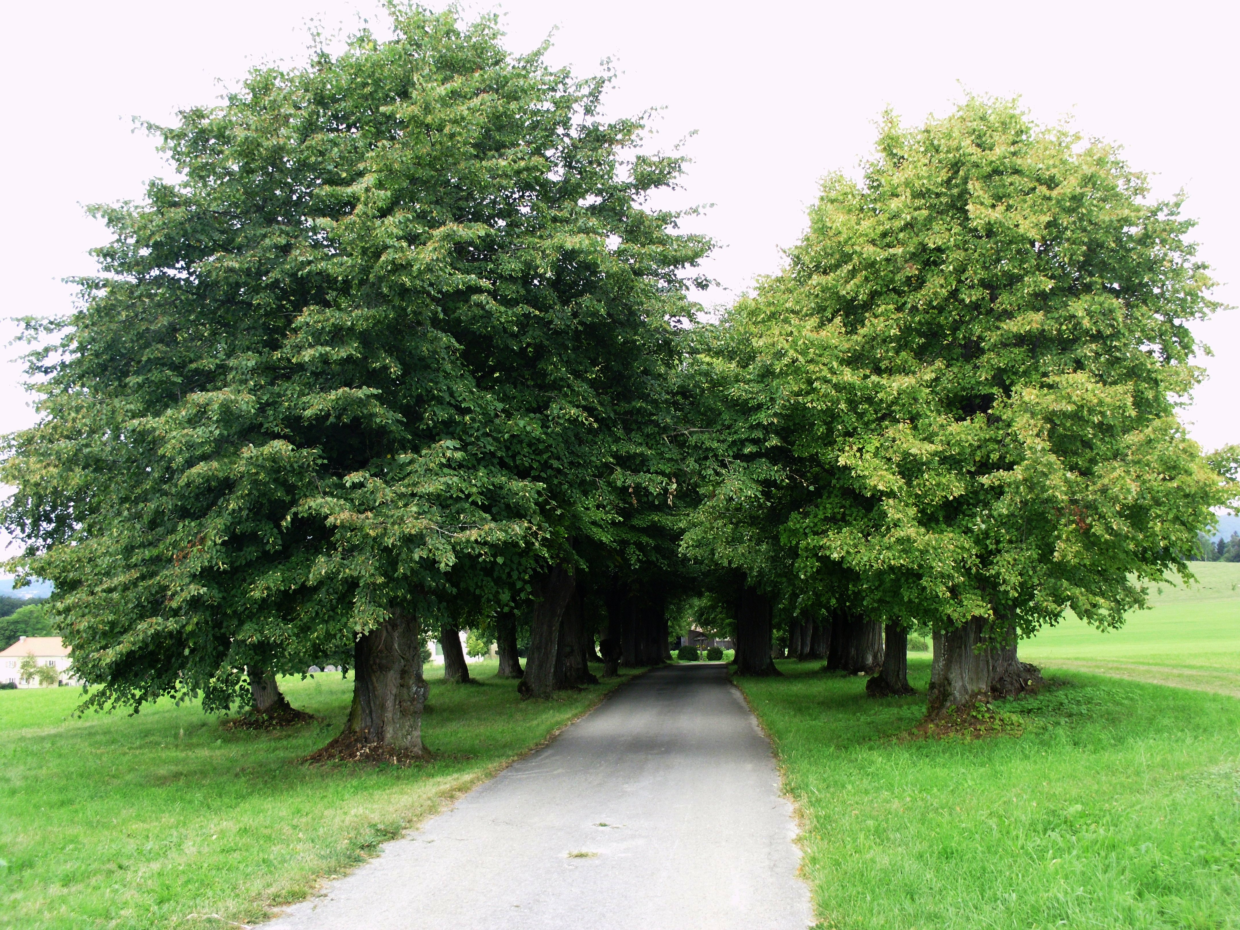 Bergnershof, Ortssteil von Treuchtlingen im mittelfränkischen Landkreis Weißenburg-Gunzenhausen, Lindenallee